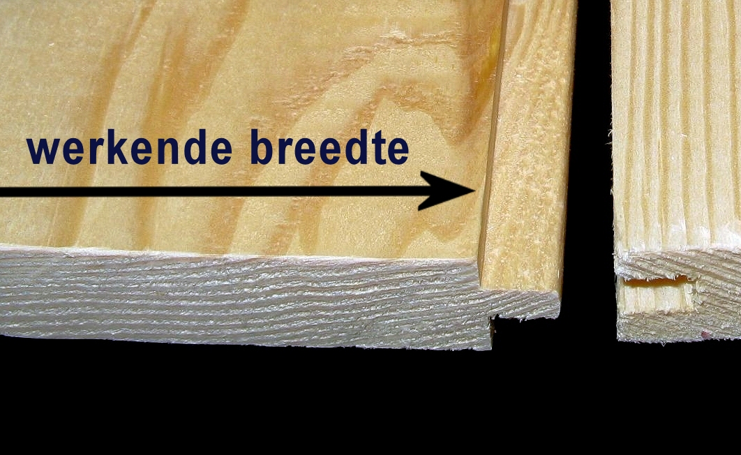 Illustratie werkende breedte